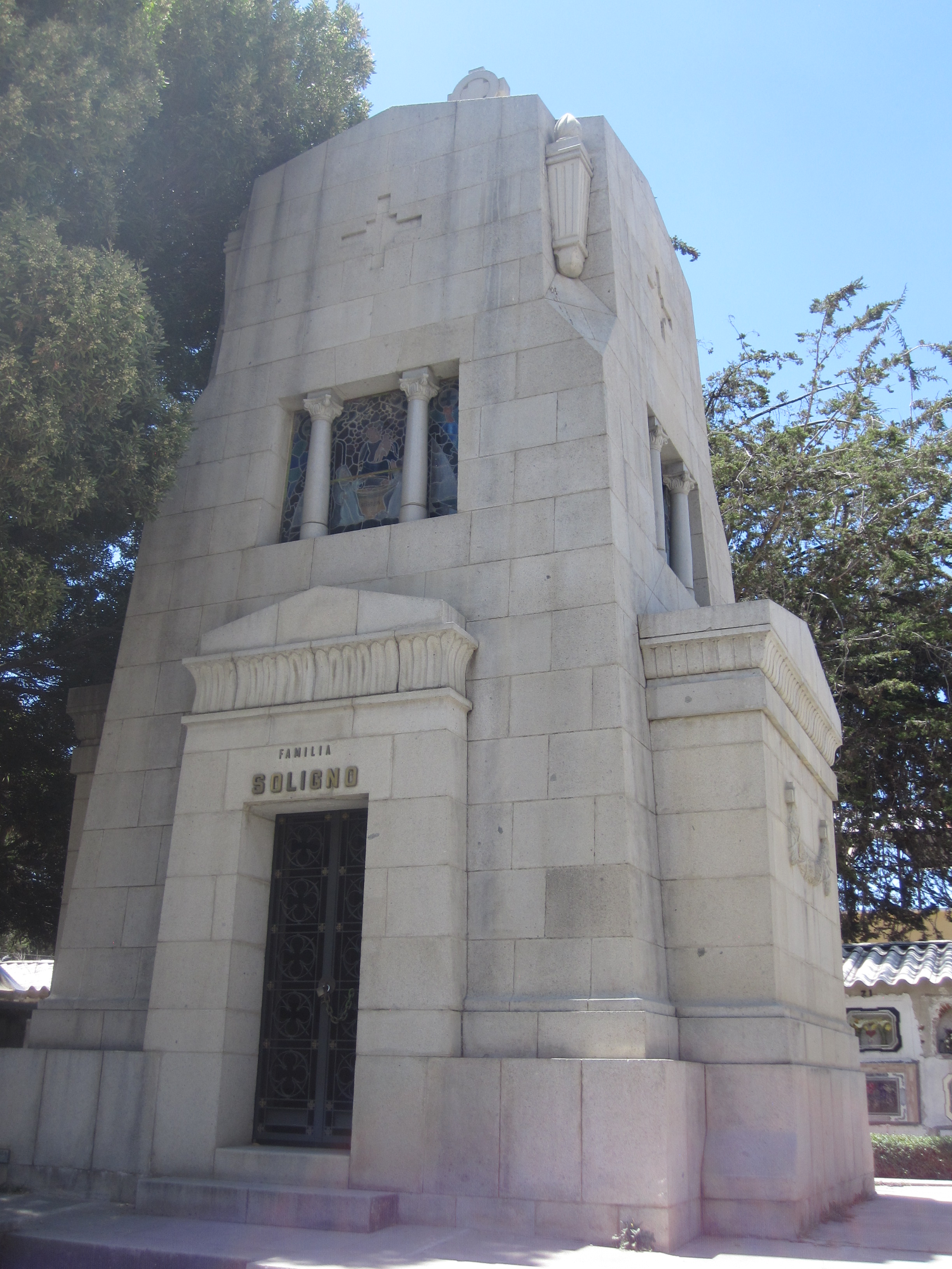 Cementerio General de La Paz This medium shows the protected monument with the number L/F0-001 in Bolivia.